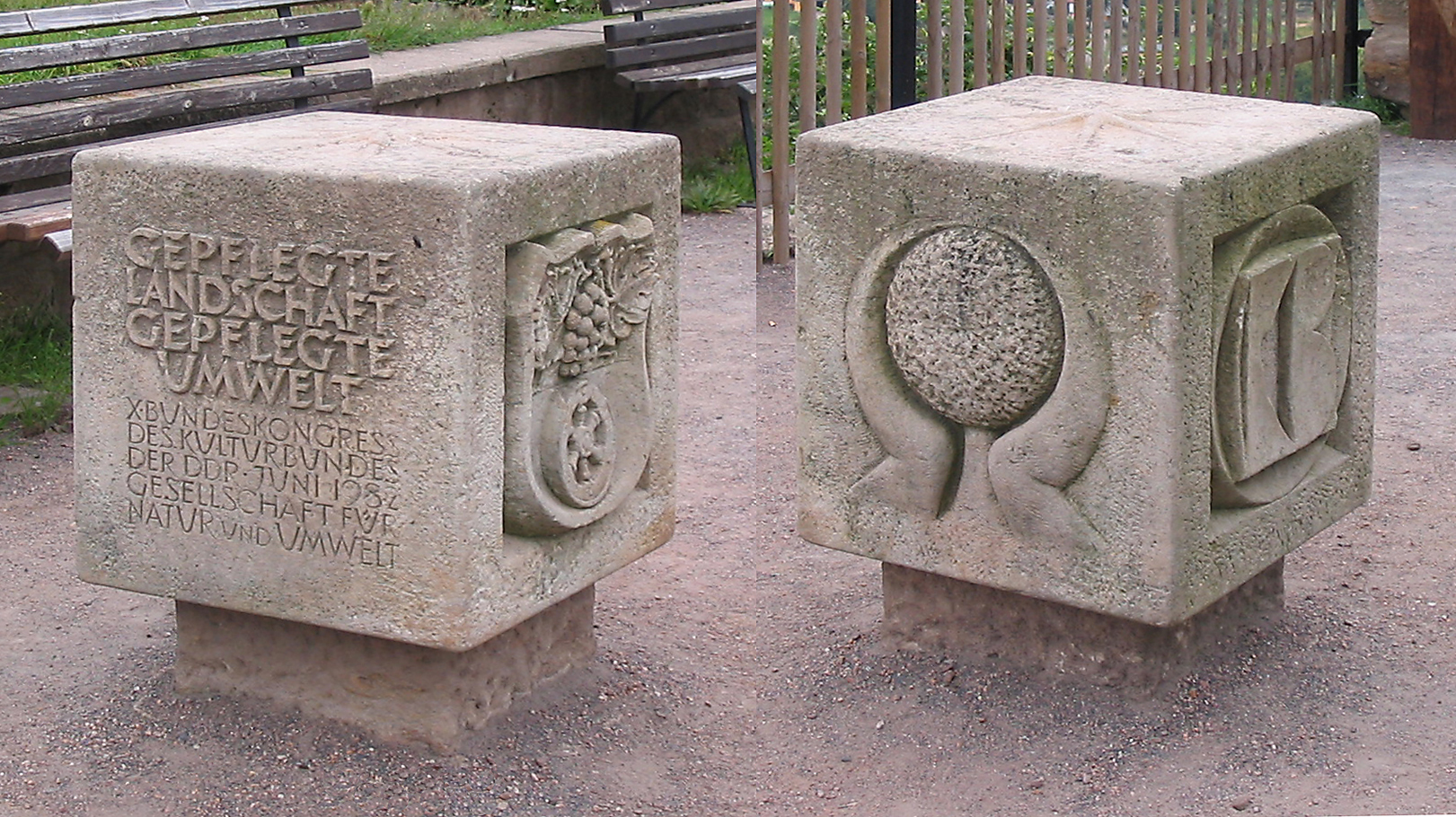 Radebeul, Gedenkstein an den Bundeskongress des Kulturbundes, Juni 1982, vor der Volkssternwarte Adolph Diesterweg Radebeul